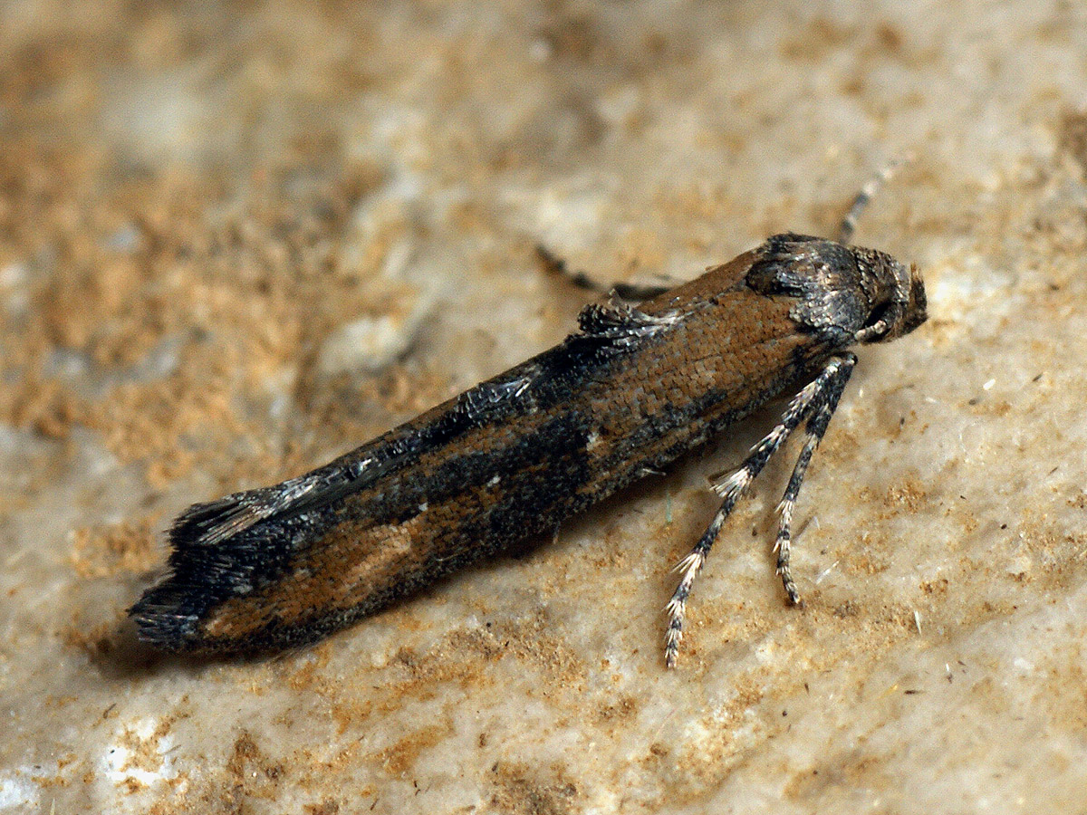 Exemplar found: Russia, Moscow Oblast, Odintsovsky District, near village Pestovo, 29.07.2017, by light МО, Одинцовский р-н, окрестности деревни Пестово, 29.07.2017, на свет